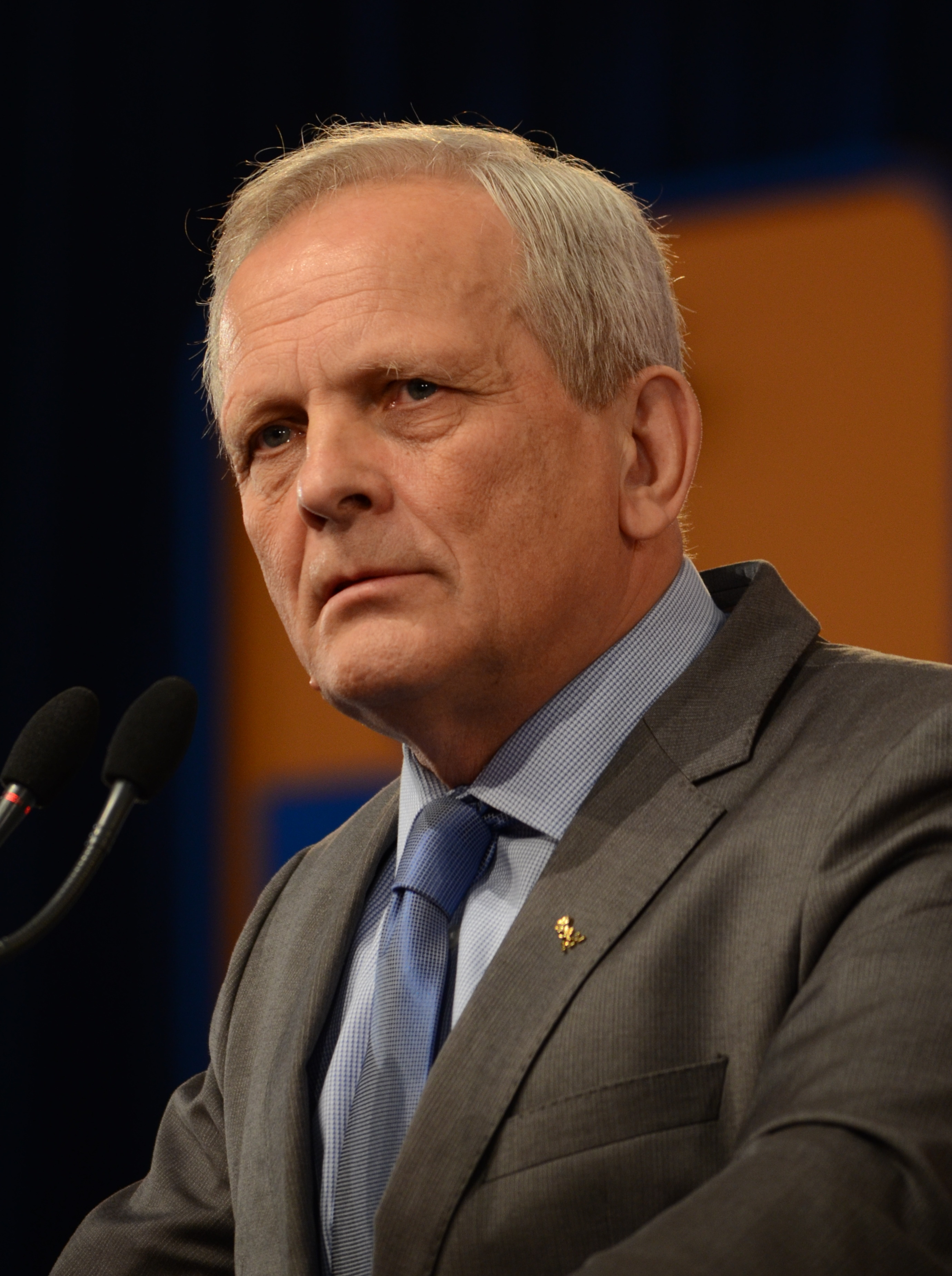 Theodor Stolojan (la Convenția națională extraordinară a Partidului Democrat-Liberal, 23 martie 2013)